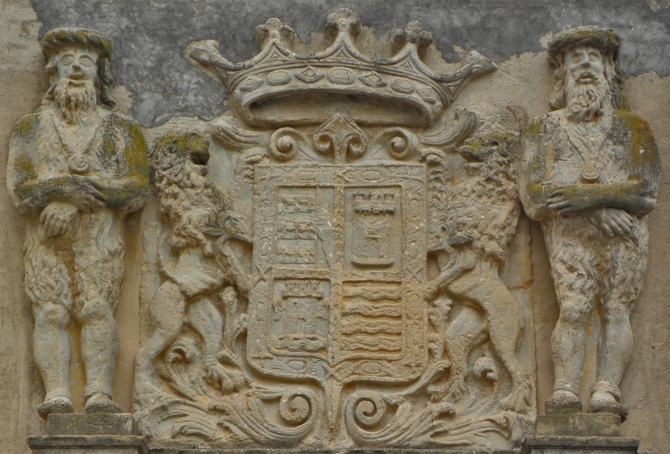 Esta foto participa en el juego En otro lugar de Flickr. Si no perteneces al grupo, no contestes, por favor. Si quieres contestar, únete